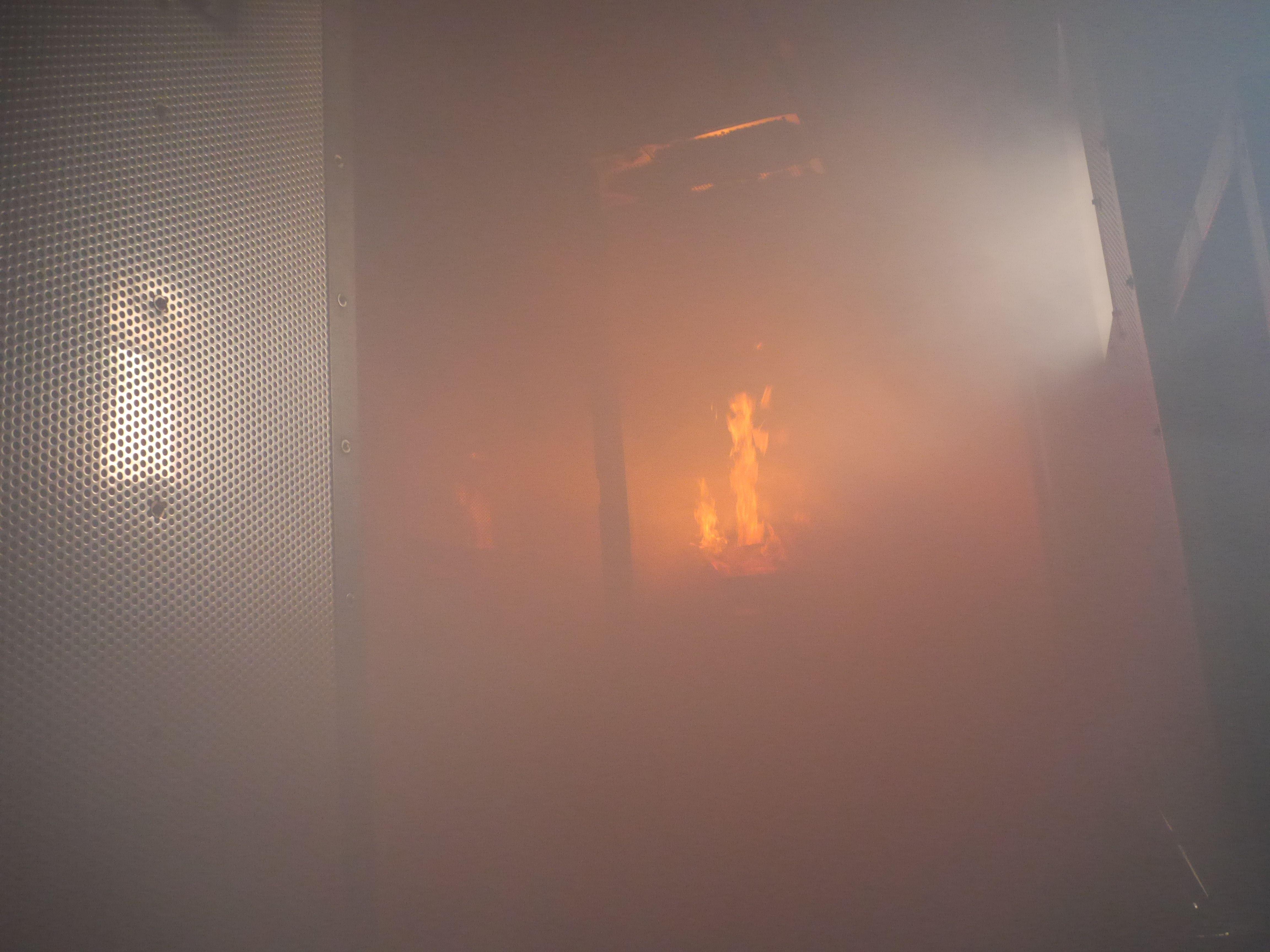 840[K]83 Scania G480 + 840-N1 Trenażer pożarowy ML-2000 This photo was taken with Panasonic Lumix DMC-GH3 camera, thanks to Panasonic. You can see all photographs in category: Taken with Panasonic Lumix DMC-GH3.